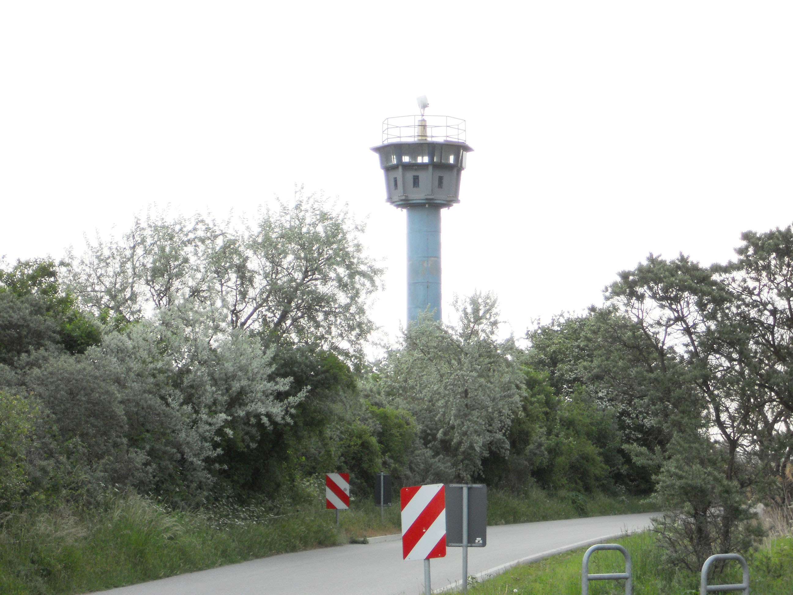 Ostseegrenzturm in Börgerende.